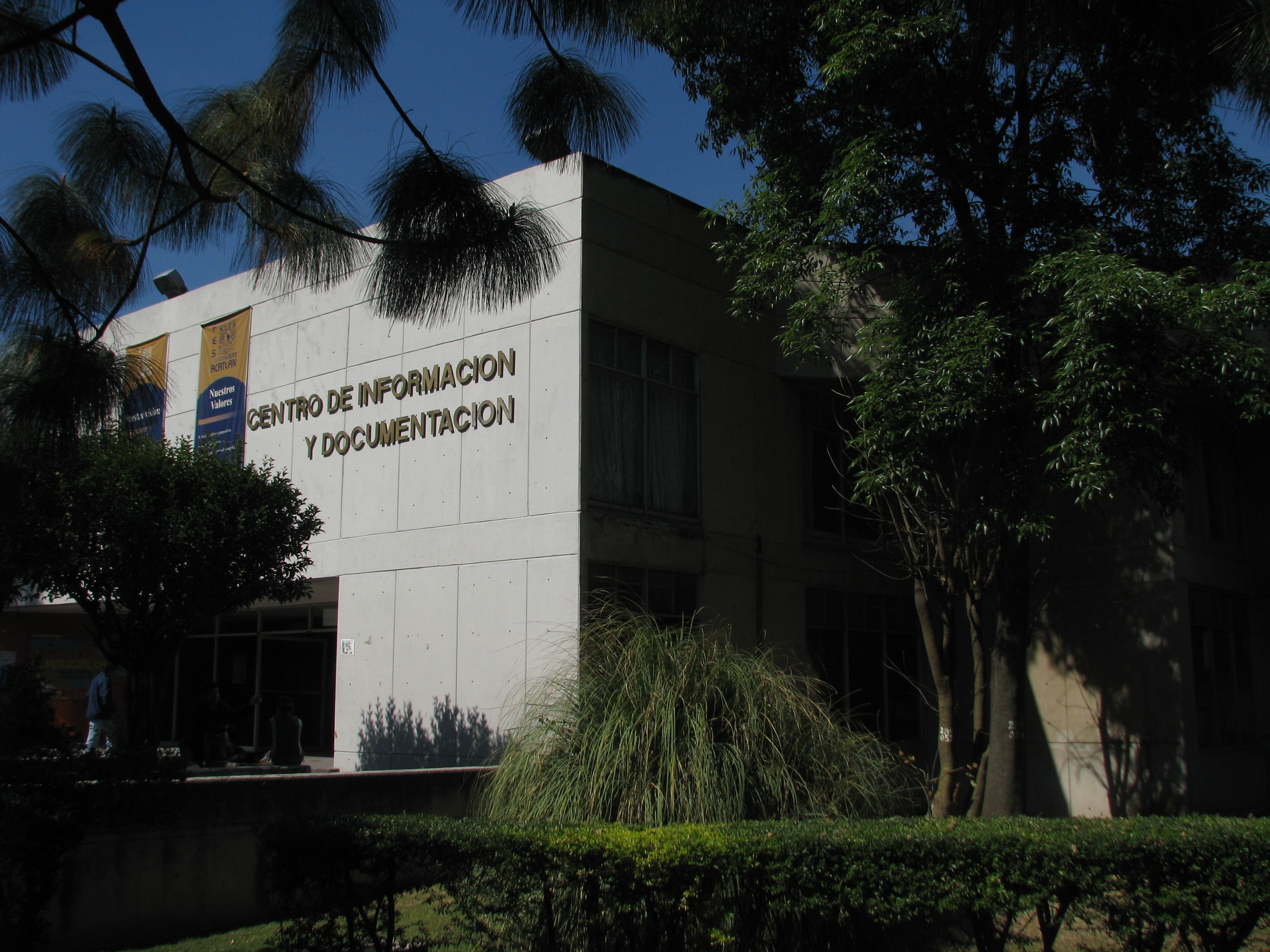 El Centro de Información y Documentación alberga el acervo bibliohemerográfico de la FES Acatlán, el cual es el más grande de la zona norte de la Ciudad de México, el segundo en número de volúmenes en el sistema de bibliotecas de la UNAM, y el tercero en títulos dentro del sistema de bibliotecas de la UNAM.